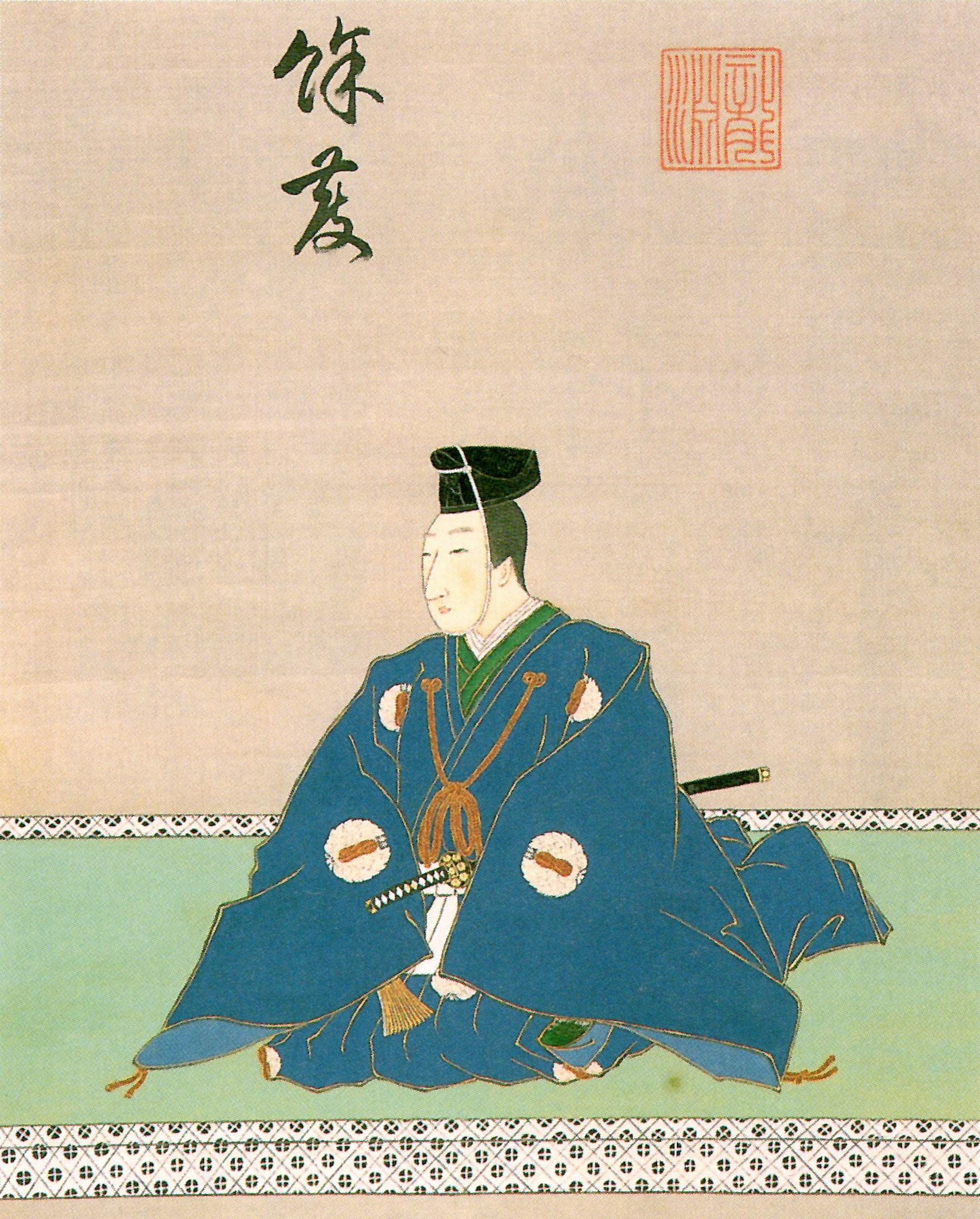 津軽信明の肖像。